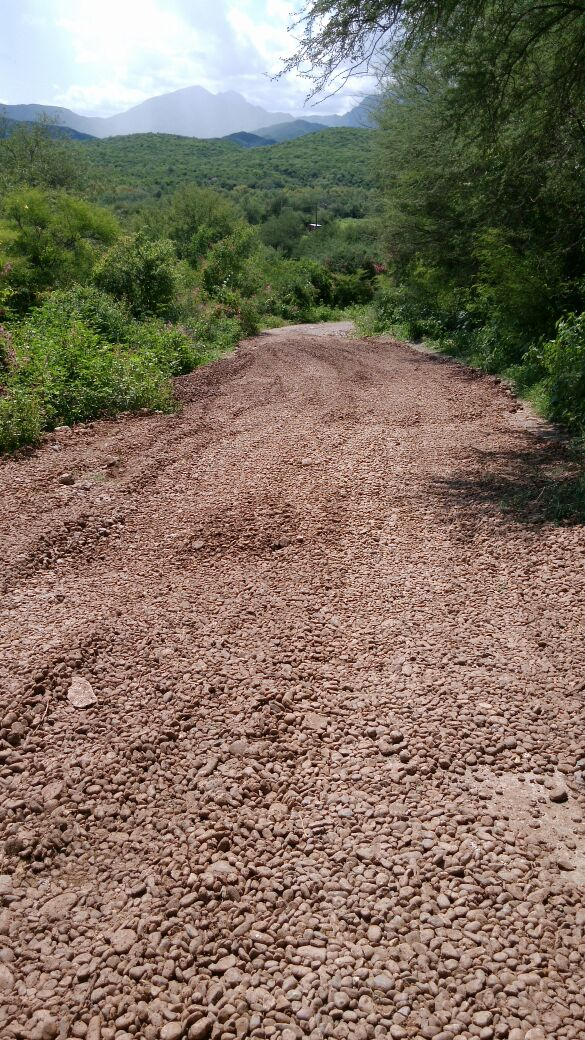 cuesta que lleva al rió